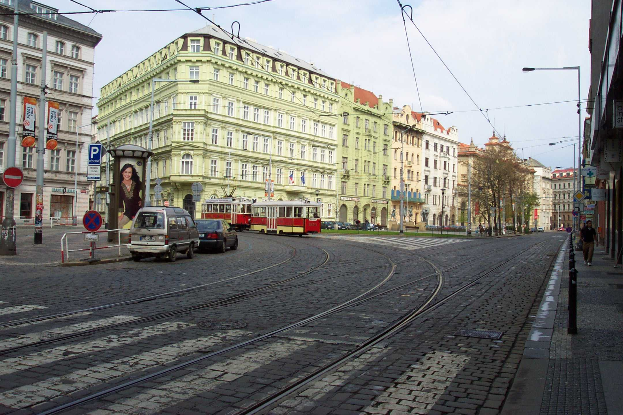 Prague, Senovážné náměstí (square) - Senovážné náměstí v Praze na Novém Městě. Na fotce nezřetelné, jediná fotka tohoto vozu - nemá to být 1530?